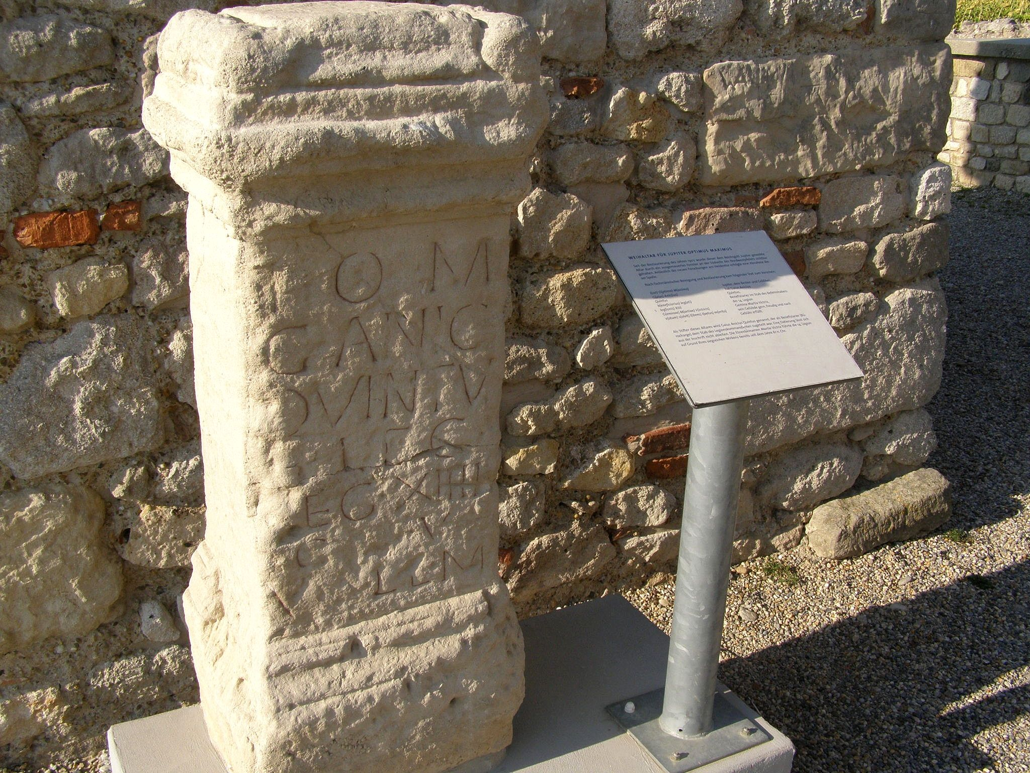 Altar votivo romano procedente de Carnuntum (Petronell, Austria), correspondiente con AE 2000, 1206 = AE 2001, 1649: I(ovi) O(ptimo) M(aximo)/ G(aius!) Anic(ius)/ Quintus / b(eneficiarius) leg(ati)/ leg(ionis) XIIII/ G(eminae) M(artiae) V(ictricis)/ v(otum) s(olvit) l(ibens) l(aetus) m(erito)